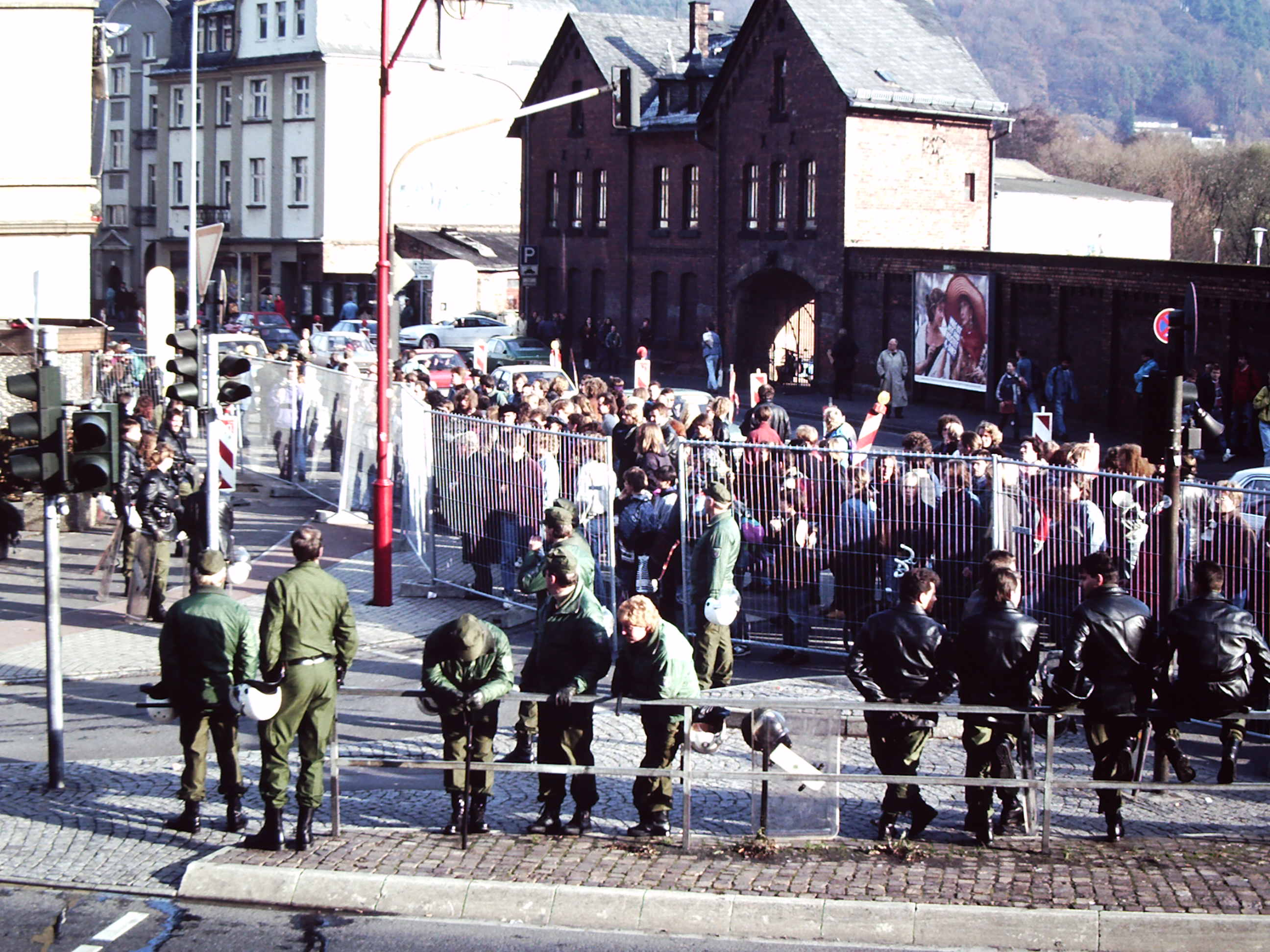 Studenteproteste und Polizeieinsatz beim Abriss der Häuser am Biegeneck, Marburg an der Lahn, Hessen